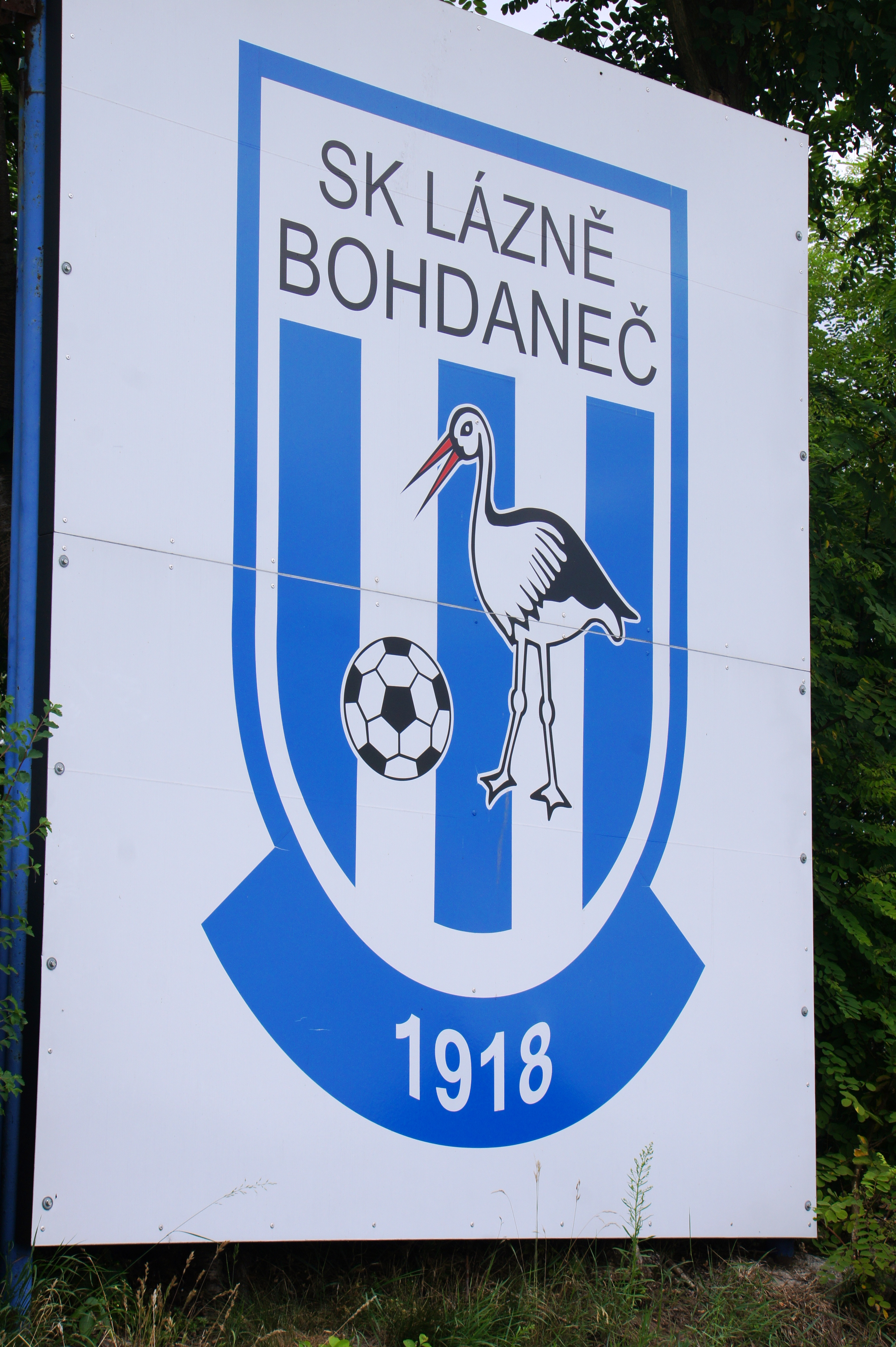 S Wappe vom Fuessballclub uf em Sportplatz vo Lázně Bohdaneč.